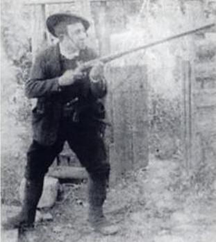 Foto del brigante Antonio Franco